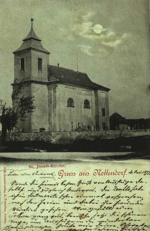 Kostel svatého Josefa v Nakléřově